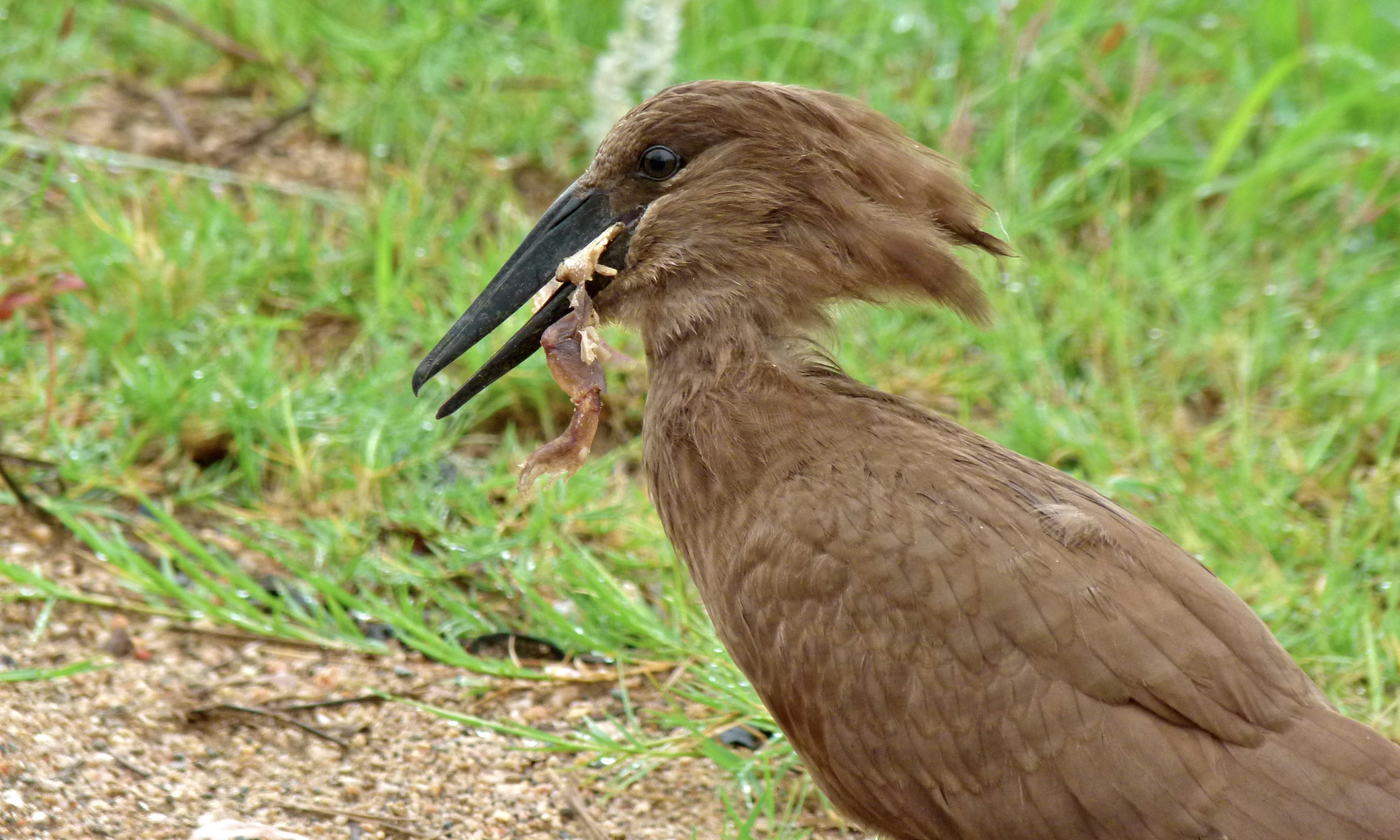 H2-2 near Afsaal, Kruger NP, SOUTH AFRICA